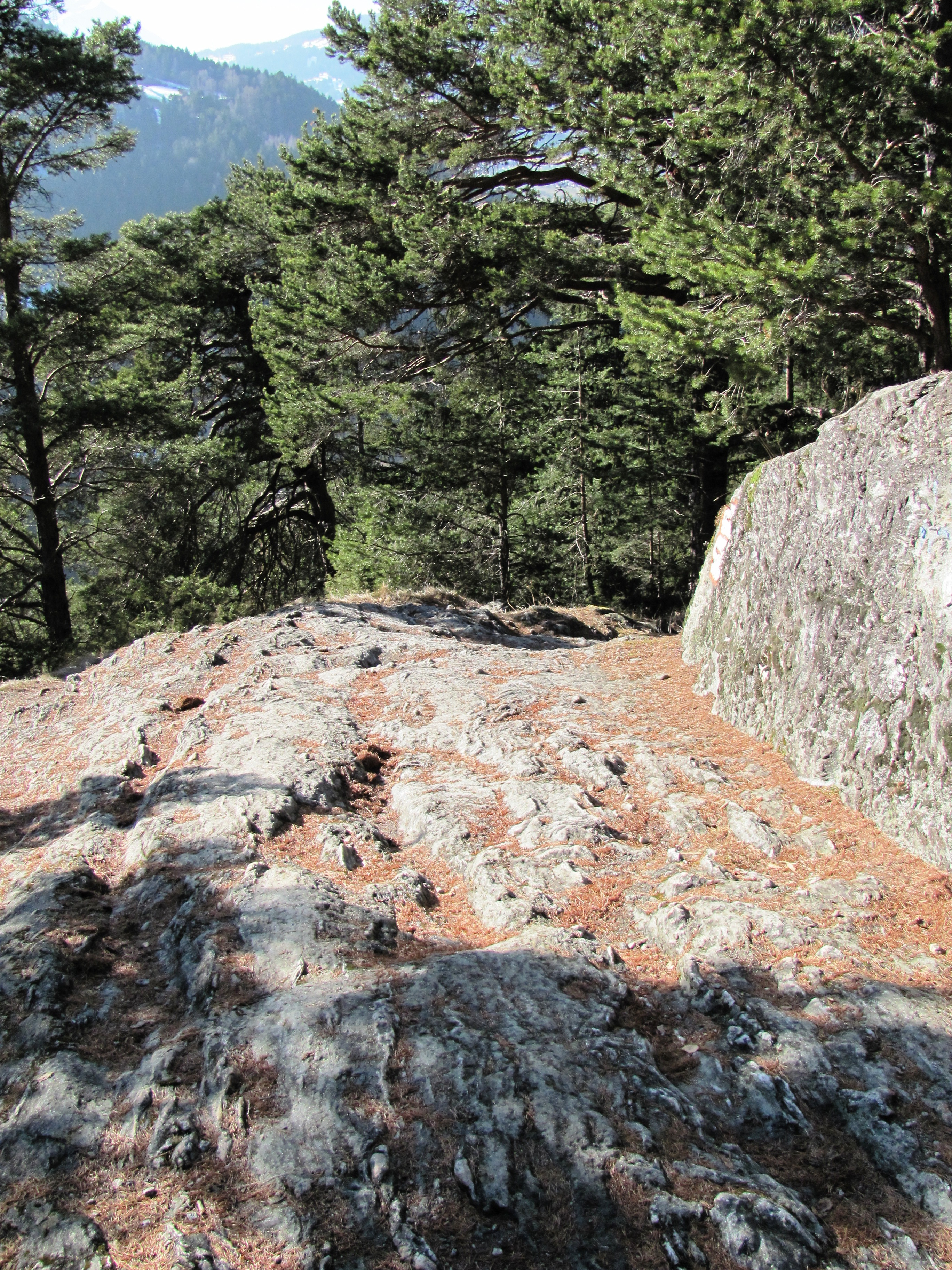 Fließer Platte, an der Via Claudia Augusta, beachten Sie die Wagenspuren